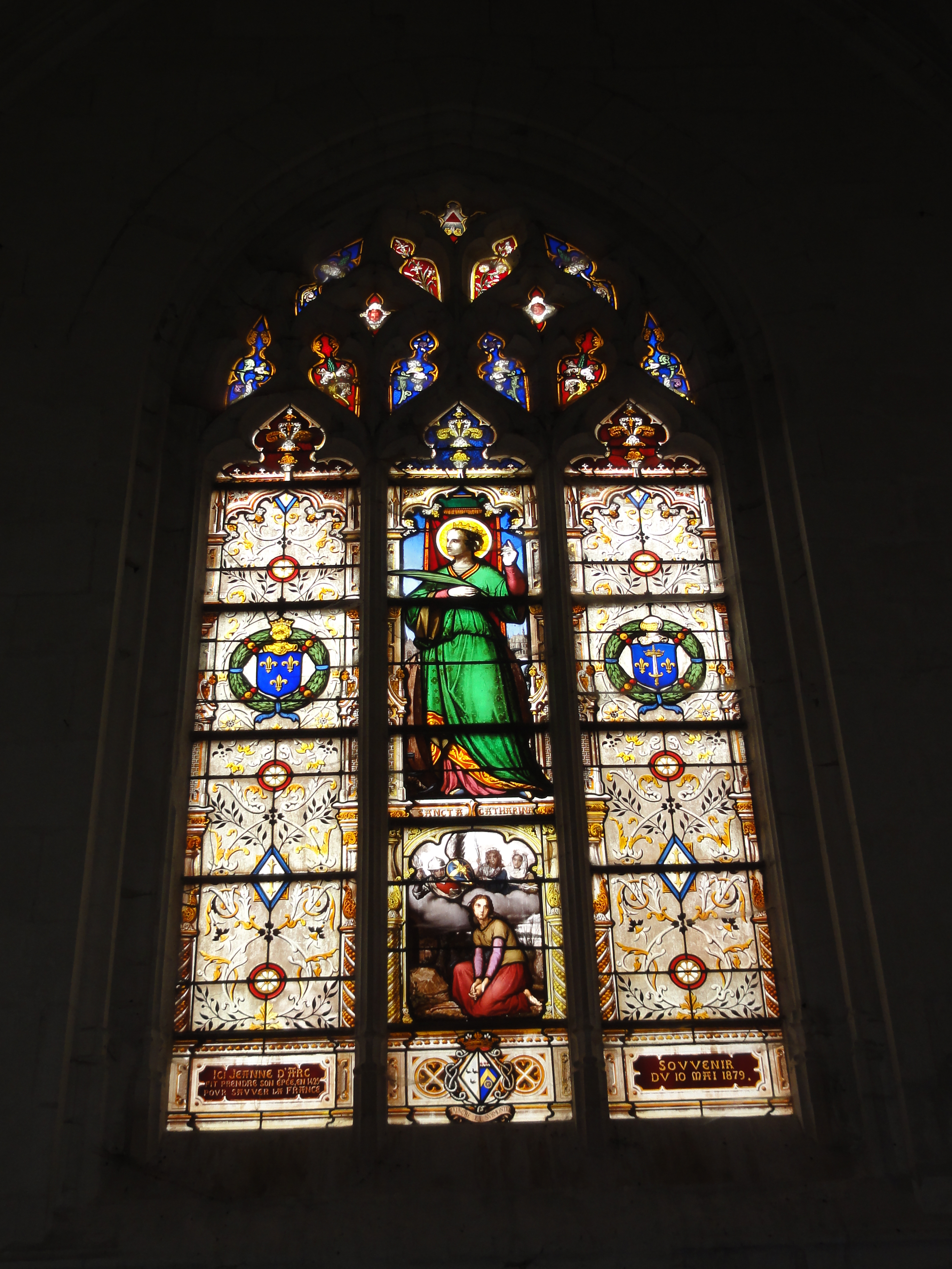 Église de Sainte-Catherine-de-Fierbois, vitrail 01